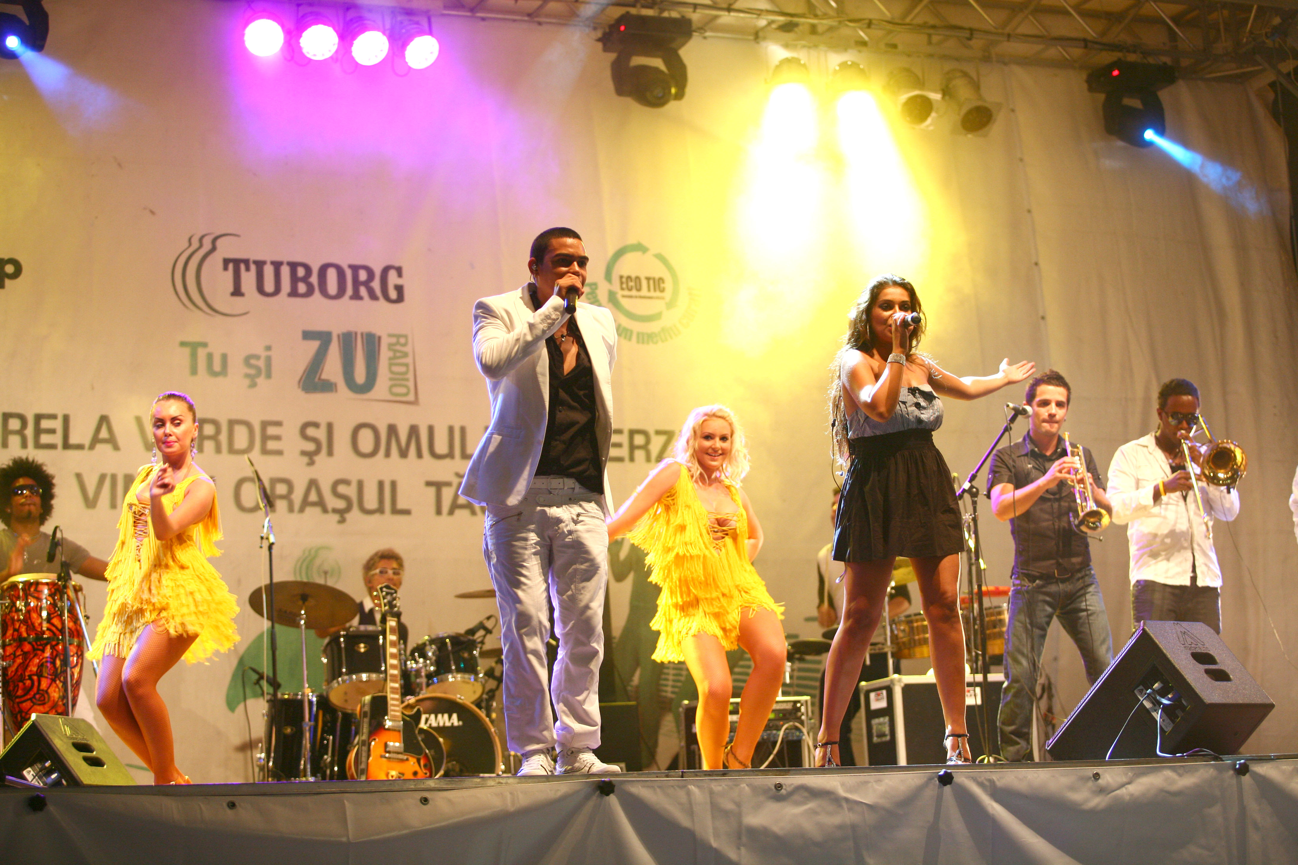 In a doua zi de campanie la Constanta, trupa Mandinga a concertat in parcare din fata City Park Mall.